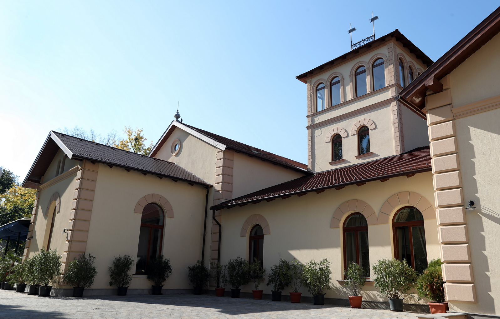 A képen az felújított Holdudvar épületének egyik oldala látható.